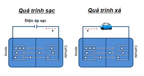 Khi xả (quá trình sử dụng), pin phóng điện qua mạch ngoài, electron từ anode (cực âm) di chuyển sang cathode (cực dương). Ion liti di chuyển trong pin, cũng từ cực âm sang cực dương. Khi sạc, dưới điện áp sạc, electron di chuyển đến anode (lúc này trở thành cực dương), để cân bằng điện, trong lòng pin, ion liti di chuyển từ cathode (lúc này trở thành cực âm) sang anode.